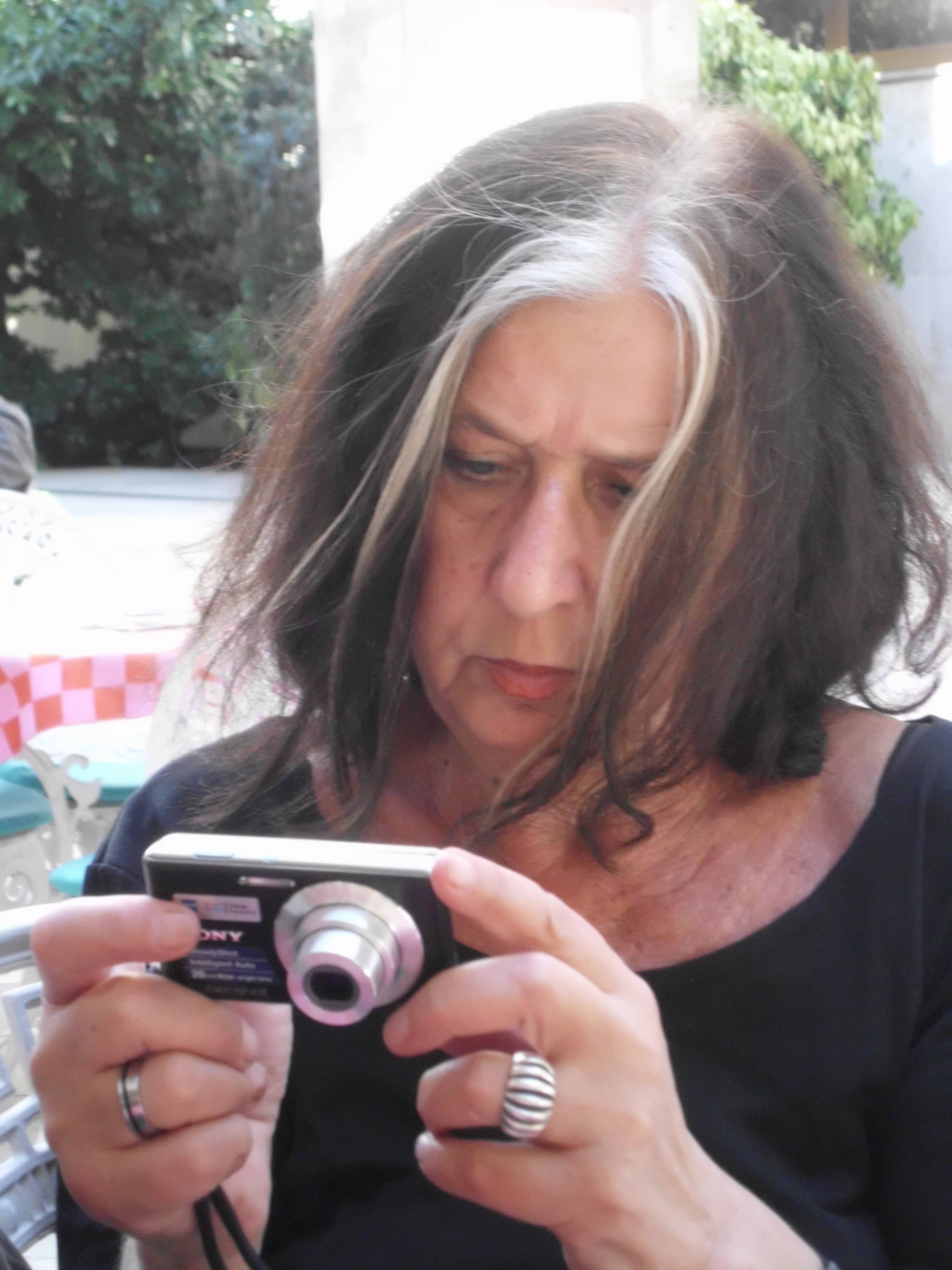 Gabriele Schmelz in Budapest